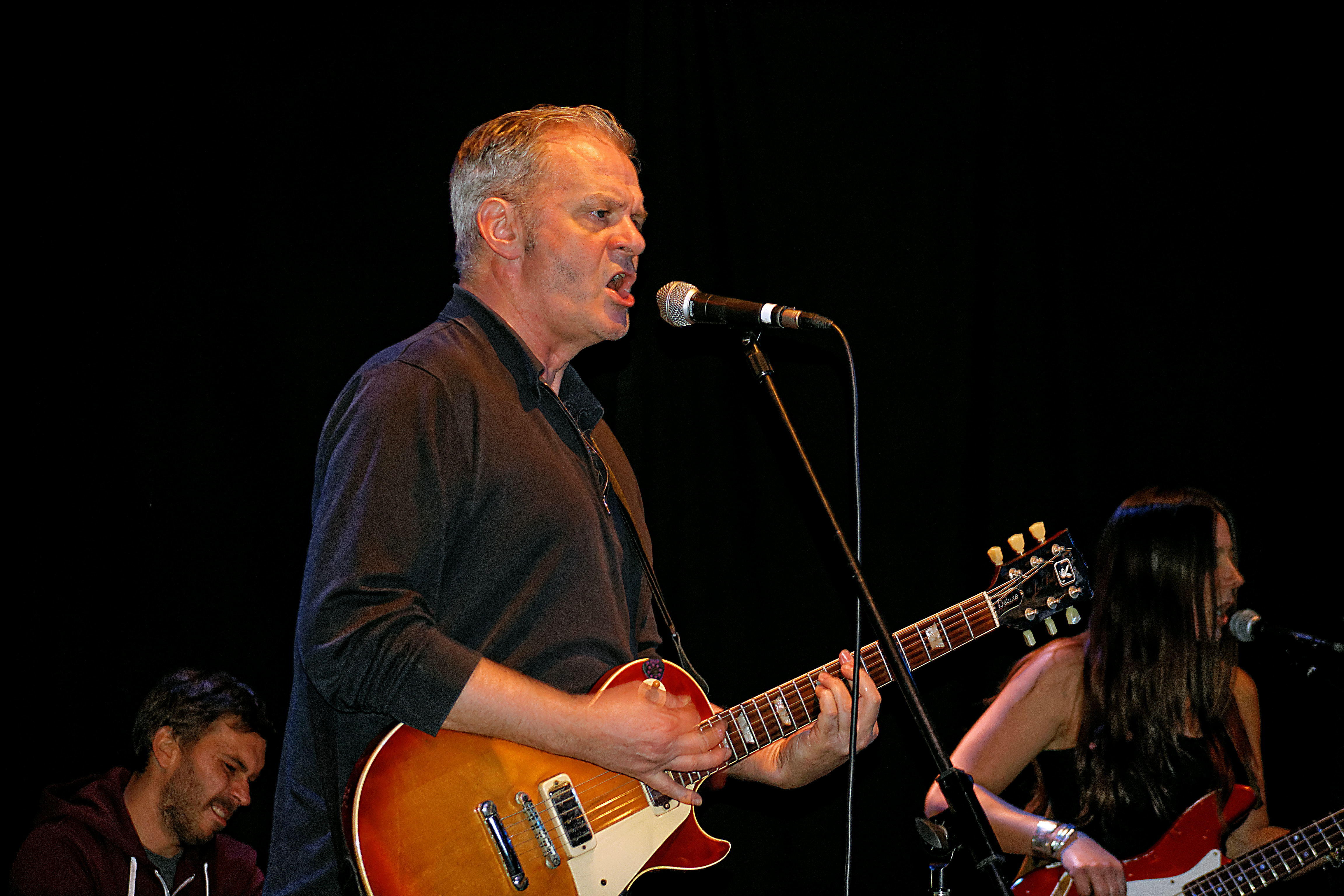 Le groupe Republik de Frank Darcel en showcase à l'occasion de la sortie du premier album le 13 novembre 2015 à la MJC de Morlaix.